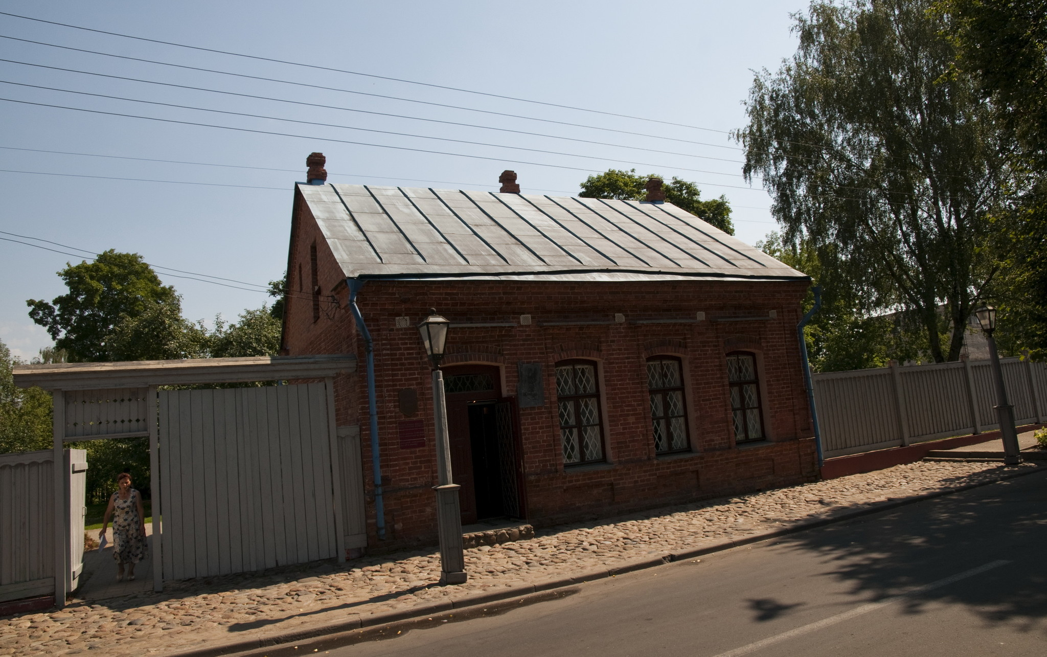 Дом Марка Шагала, Витебск, Белоруссия